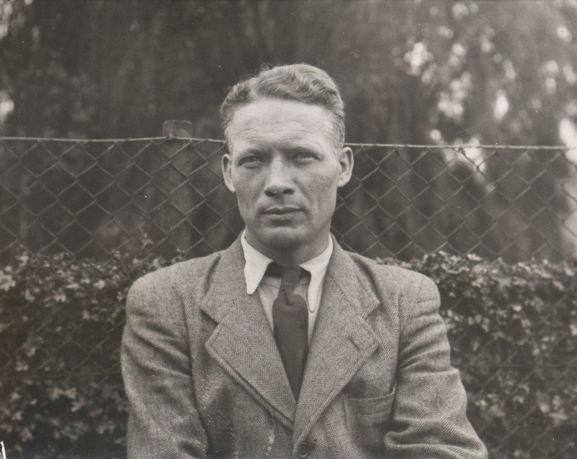 Ingeniør og modstandsmand